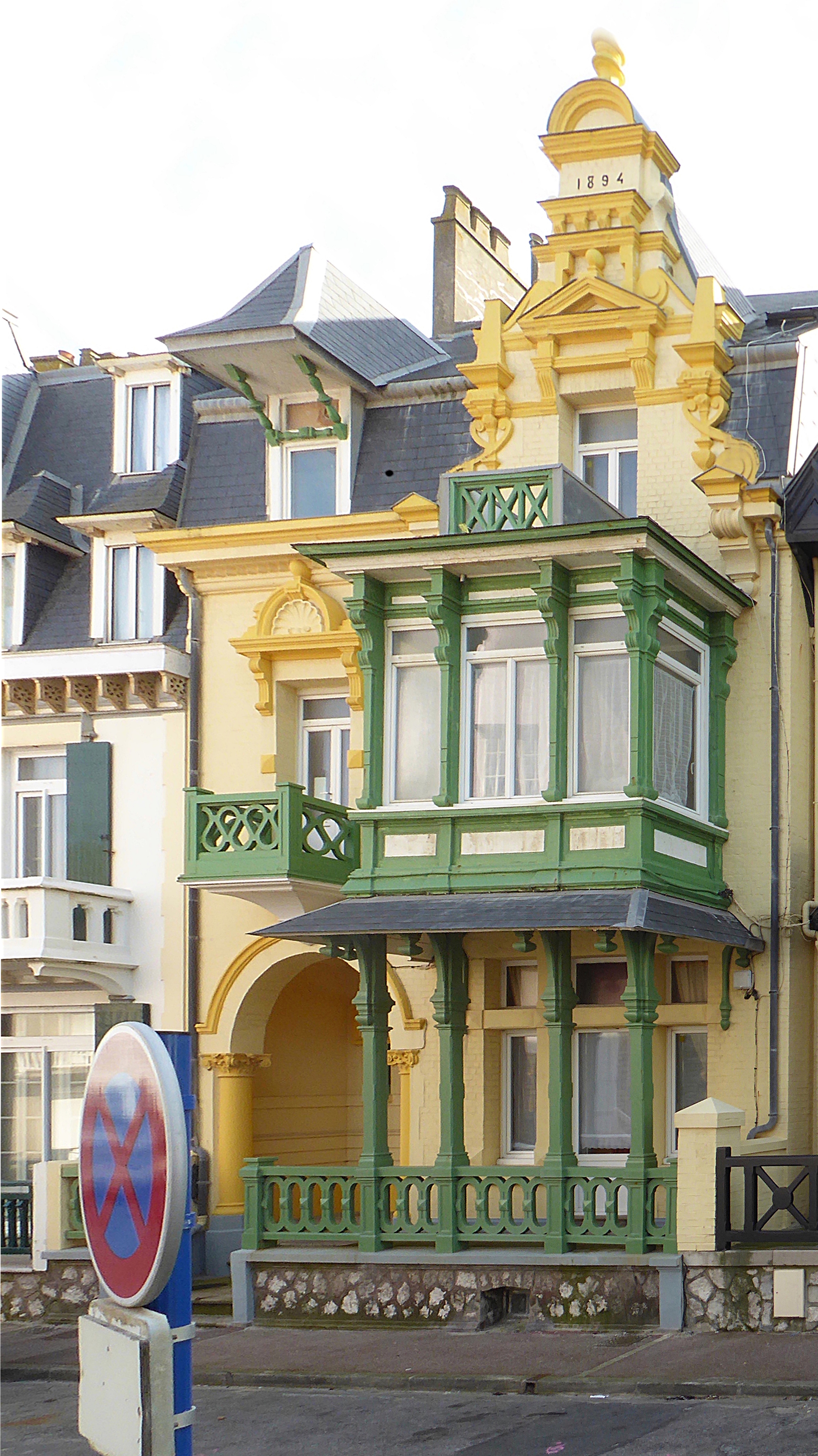 Wimereux Maison dite Villa Martin Pêcheur .